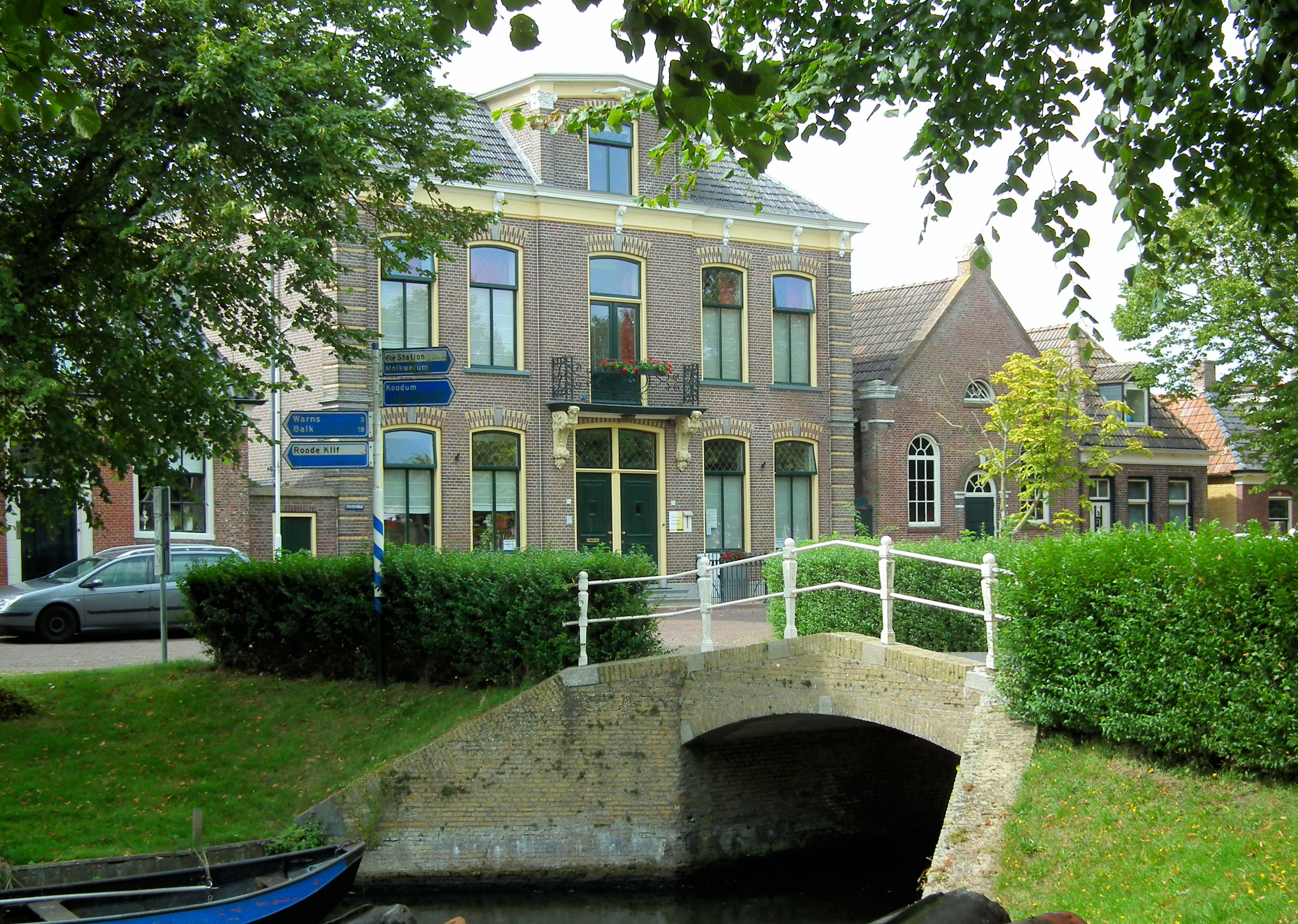 Nederland - Friesland - Stavoren - Stavoren is Hanzestad en Frieslands oudste stad. Pittoreske grachtjes. Een aantal fraaie panden.